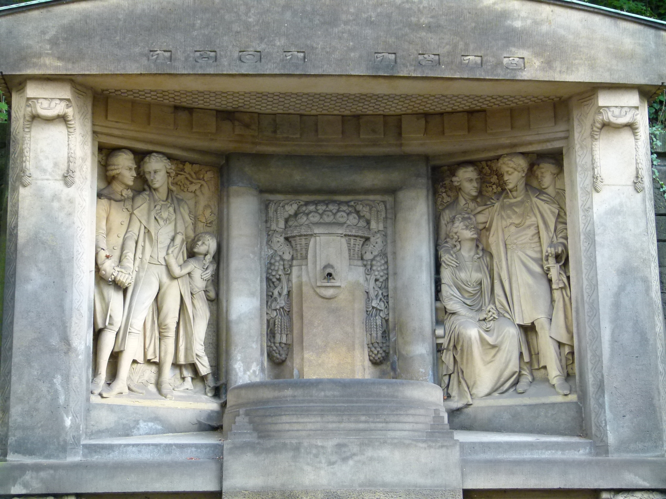 Schiller-Körner-Denkmal in Loschwitz, Schillerstraße, Dresden